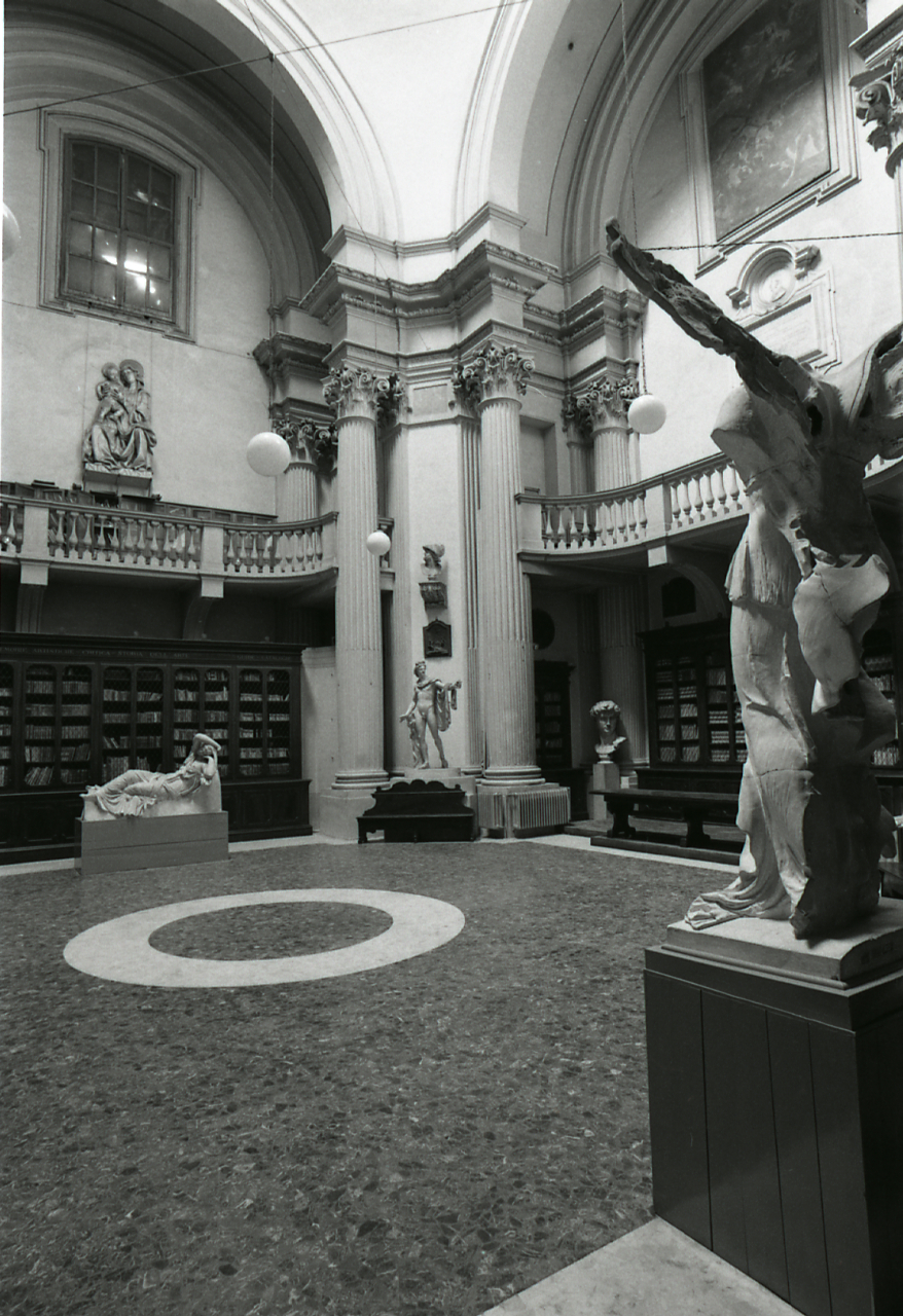 Servizio fotografico : Bologna, 1974 / Paolo Monti. - Strisce: 6, Fotogrammi complessivi: 28 : Negativo b/n, gelatina bromuro d'argento/ pellicola ; 35 mm. - ((Sul portanegativi: N[I]K[MA]T FP4. - Occasione: Pubblicazione. - Fonte: Agenda di Paolo Monti: Leica 1501-3000 Controllo numerazione (1950-1978), presso Archivio Paolo Monti. - Fonte: Monografia di Università degli studi [Bologna]: Rassegna storica dell'insediamento: catalogo ragionato delle realizzazioni edilizie universitarie in rapporto all'assetto urbano, Bologna, Tip. Labati e Nanni (1974). - Fonte: Fattura di Paolo Monti: IV. Commesse/ Fattura n. 20 (1974/10/21), presso Archivio Paolo Monti